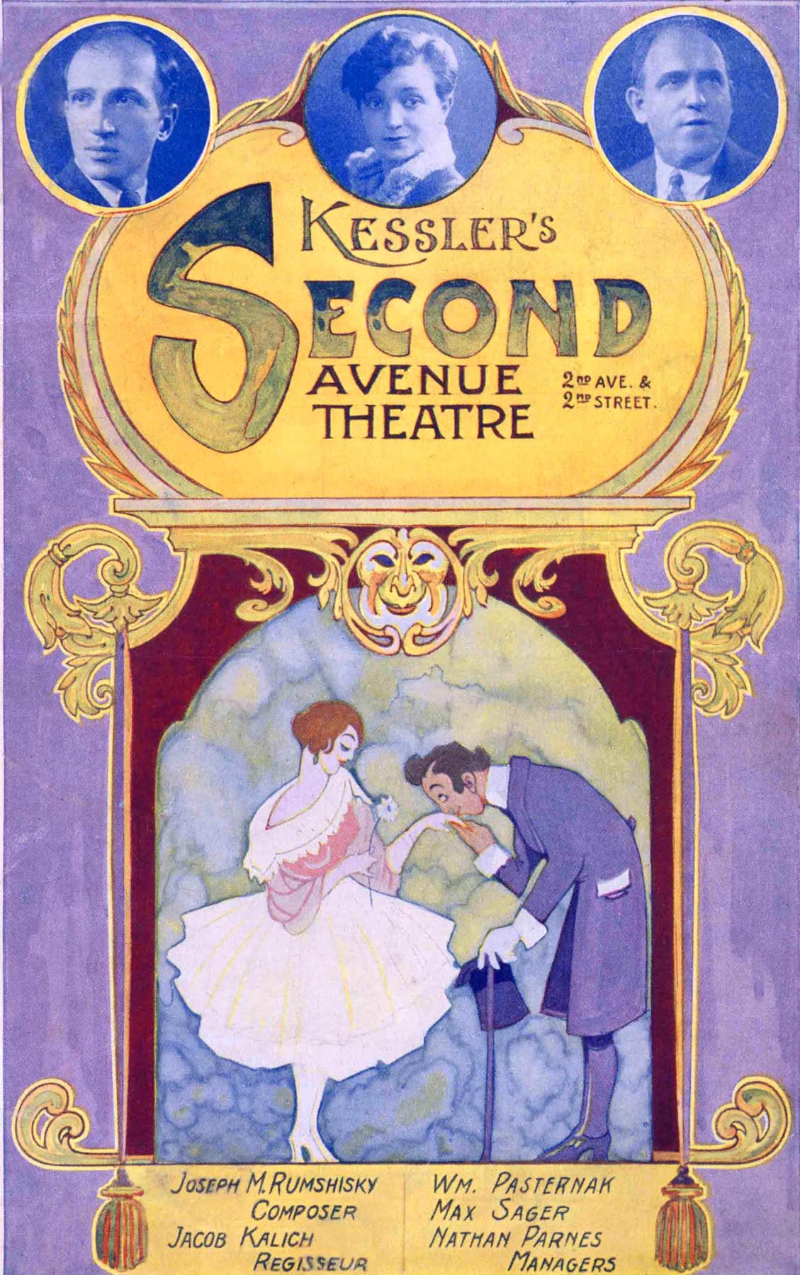 Афиша КесслераАфиша Театра Кесслера на Второй Авеню